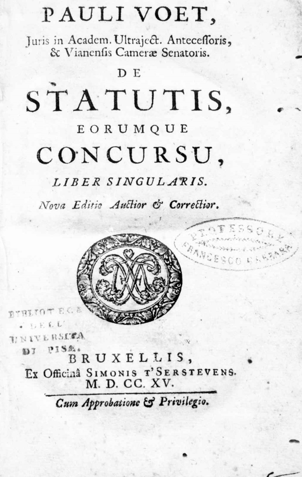 Frontespizio